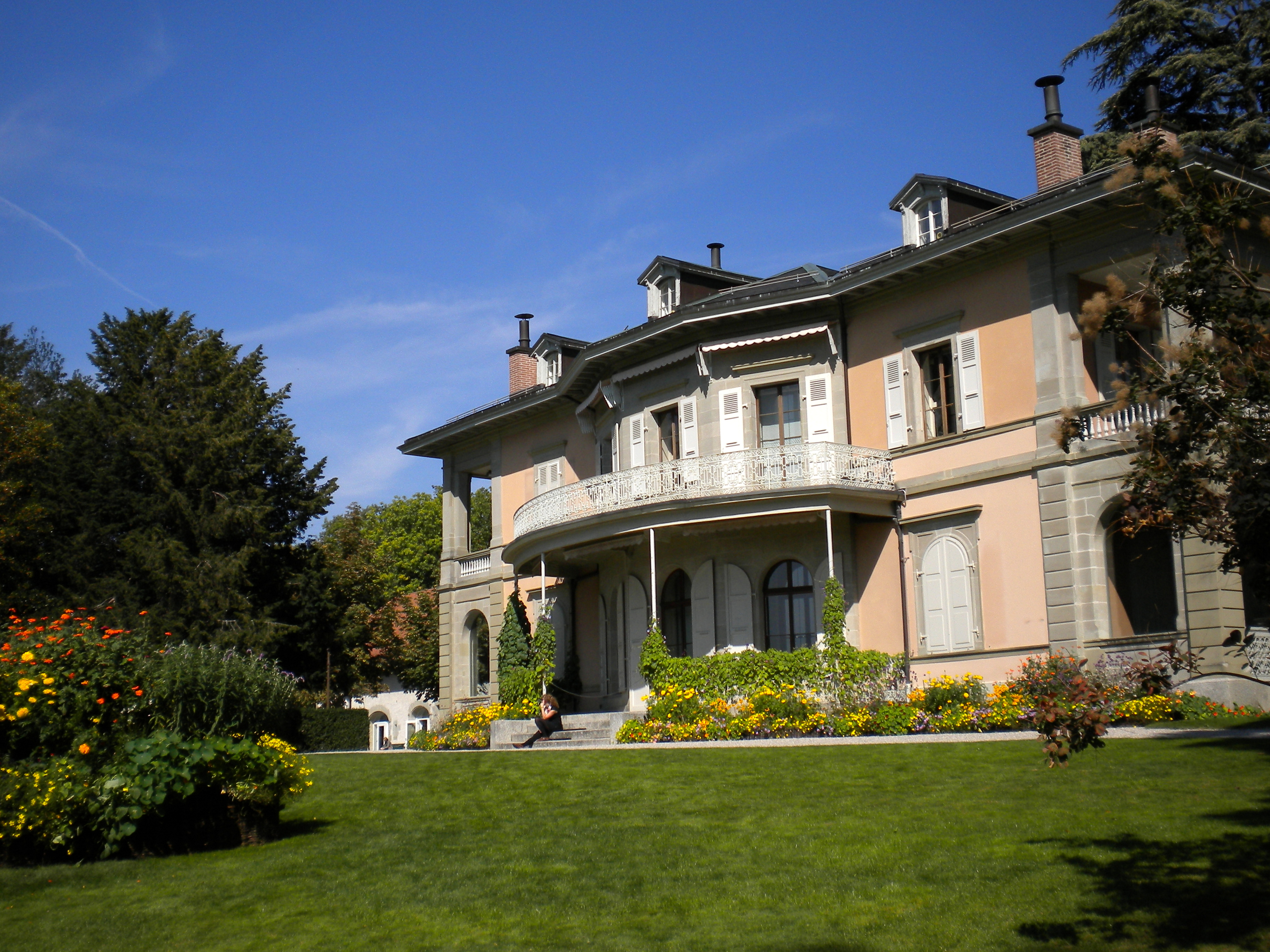 Herrenhaus mit Park und Museum